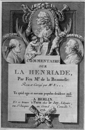 Commentaire sur la Henriade de La Beaumelle publié par Fréron